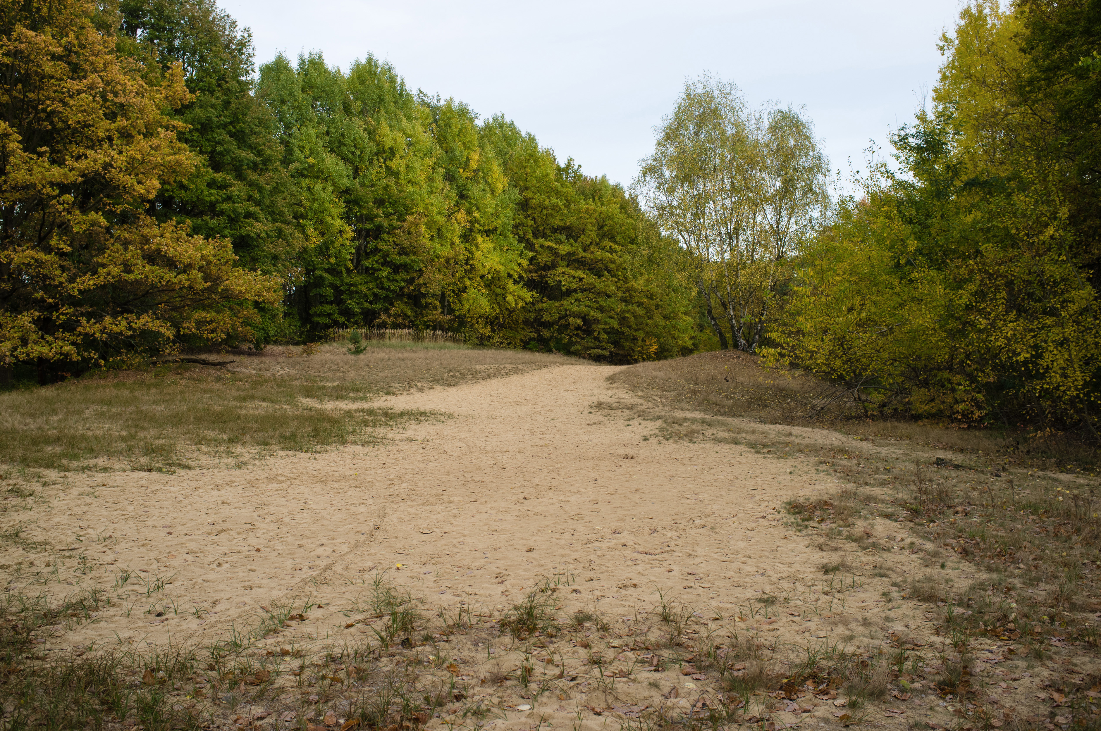 Baumberge (Berlin)